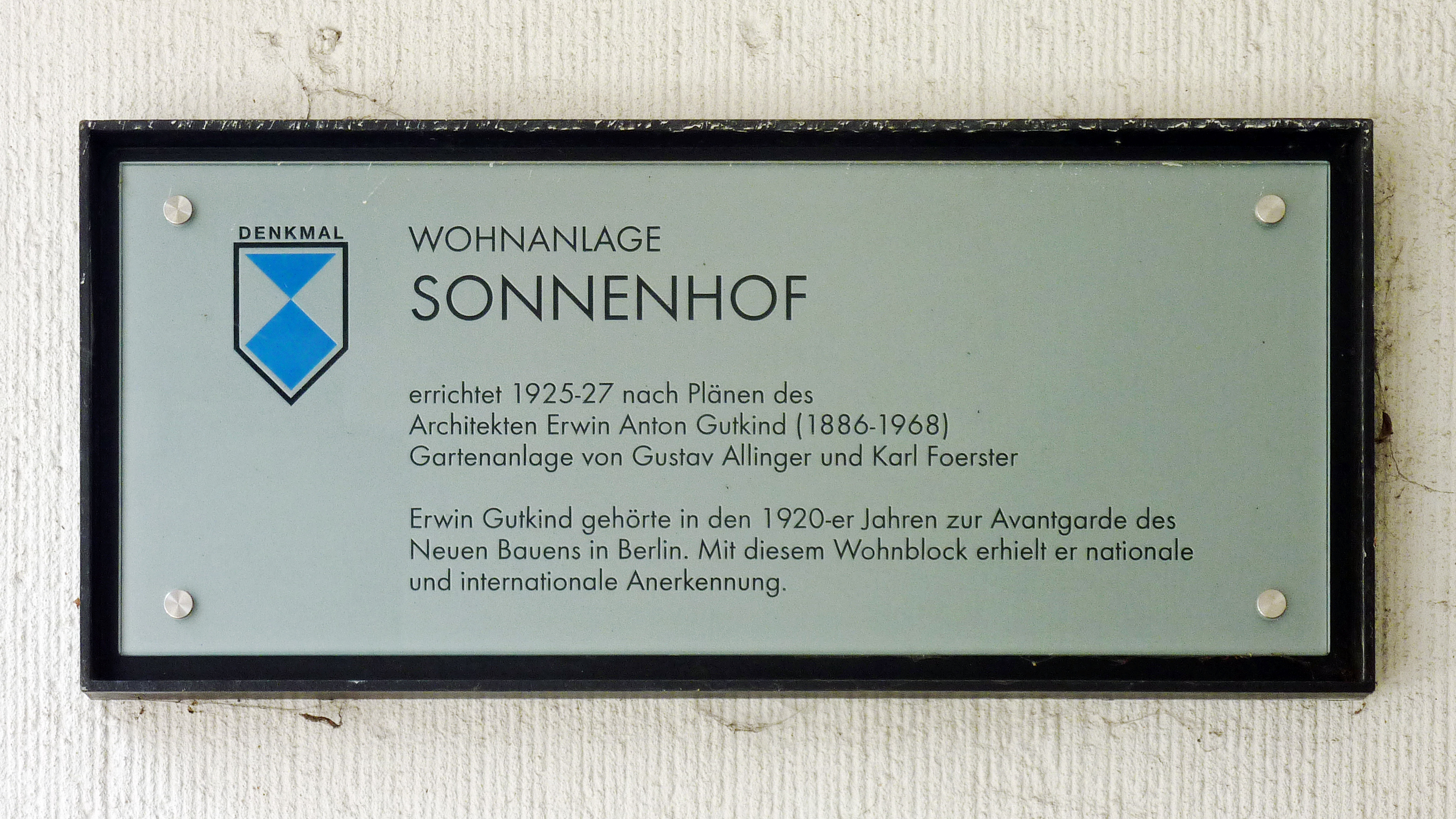 Denkmaltafel an der Wohnanlage Sonnenhof von Erwin Anton Gutkind, Eingang Archenholdstraße 72 in Berlin-Friedrichsfelde. Enthüllt am 14. September 2003. [1]